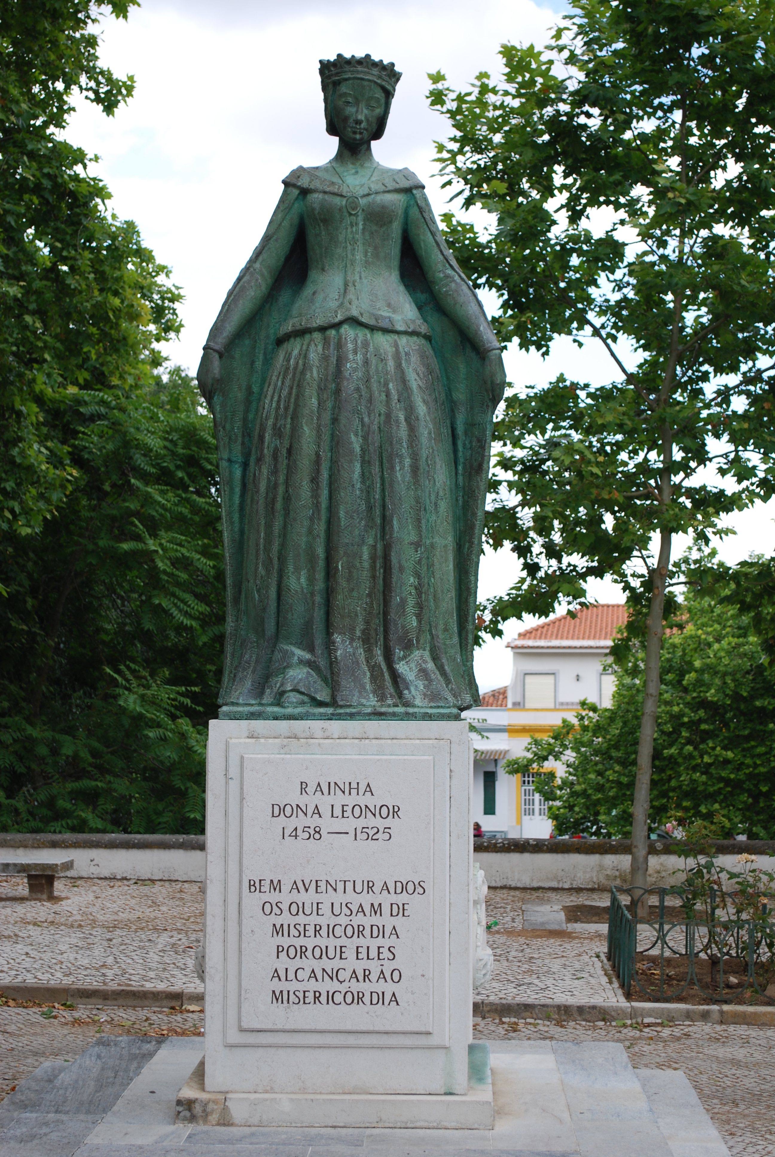 Álvaro de Brée, Estátua da Rainha Dona Leonor, 1958, junto ao Museu Rainha Dona Leonor (Igreja de Nossa Senhora da Conceição) em Beja